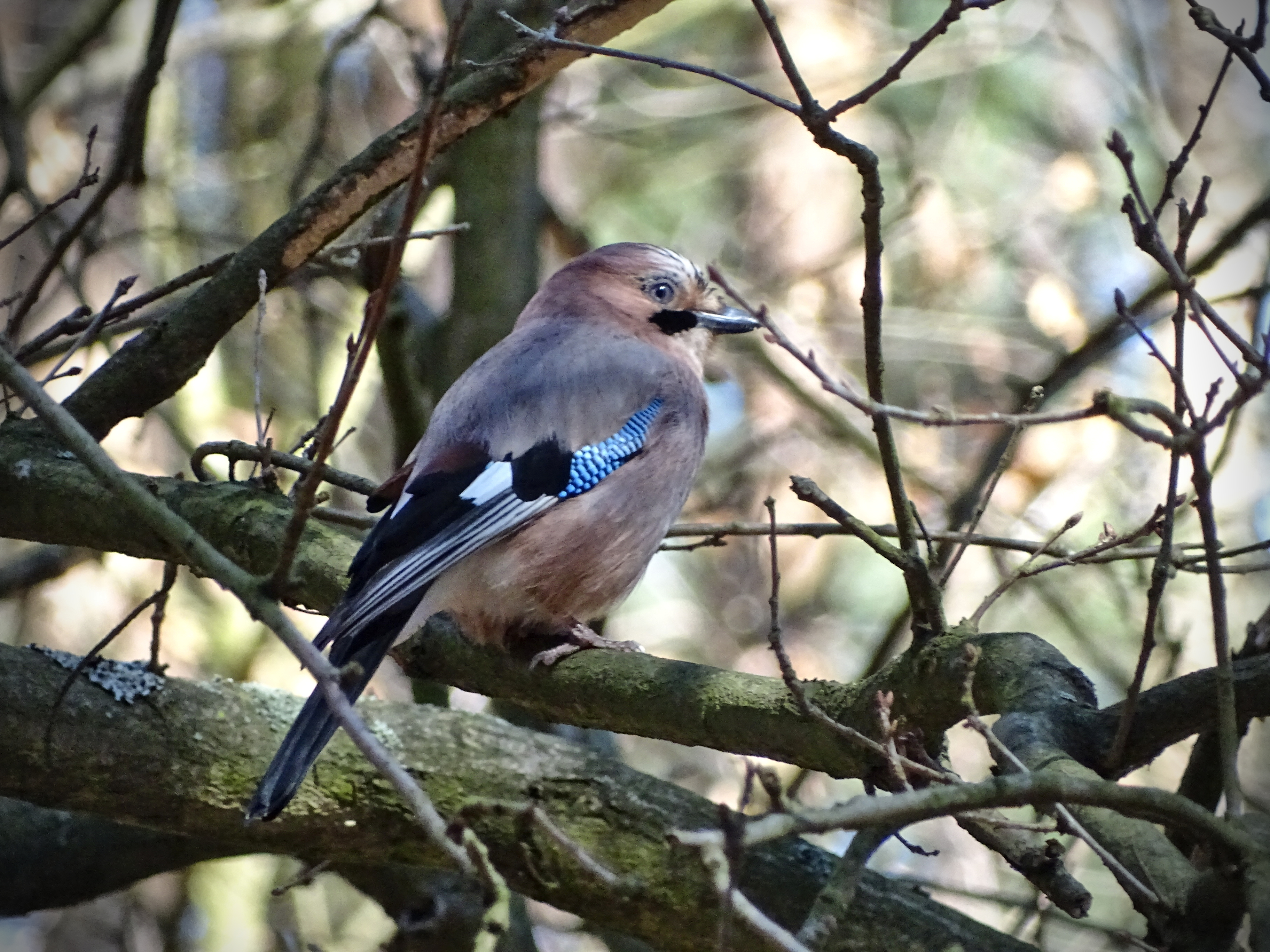 Sójka zwyczajna. Zdjęcie wykonano 02.04.2016 r. w lesie w Lesznie.